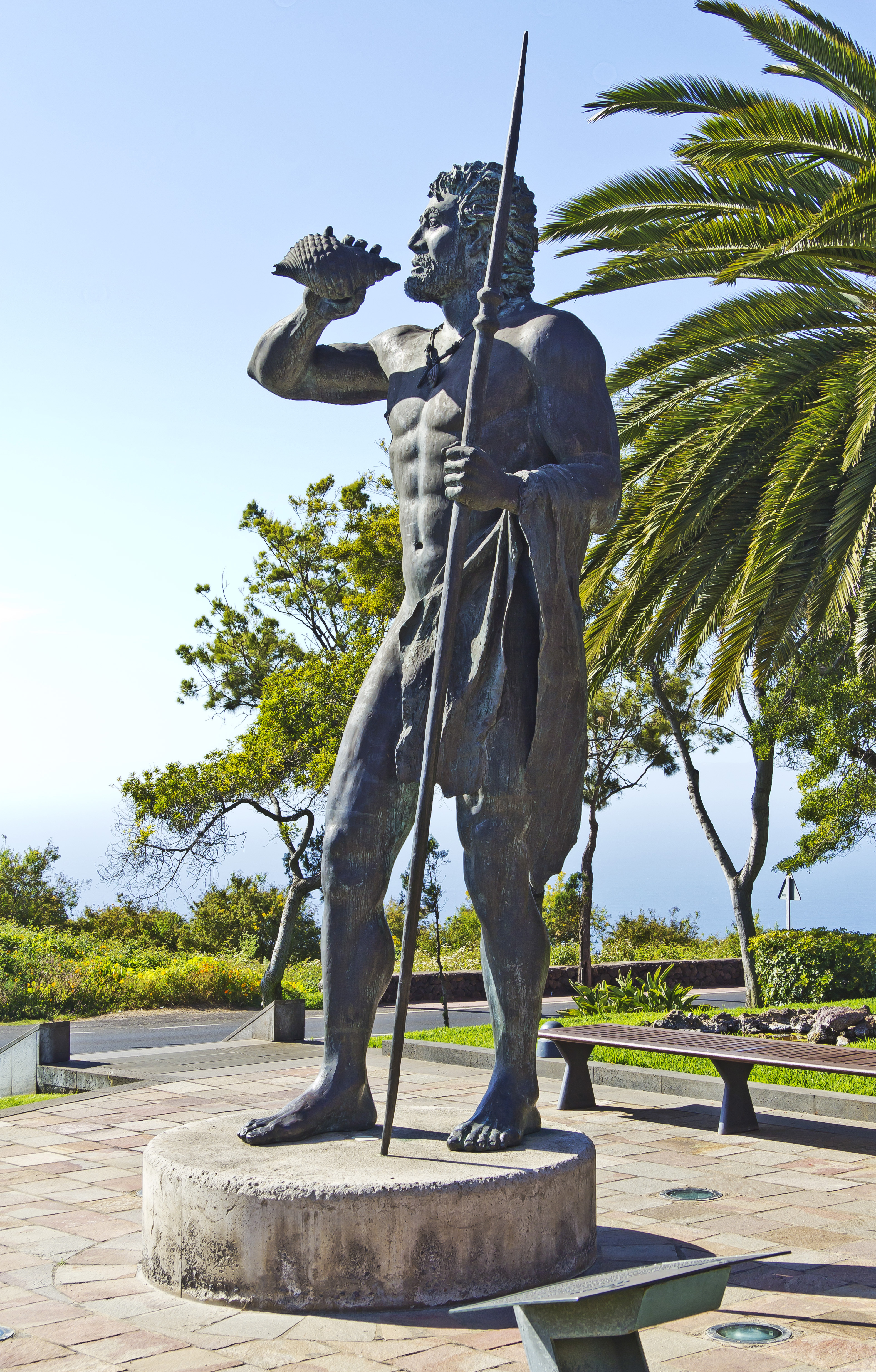 El Mencey Tinguaro, La Matanza de Acentejo